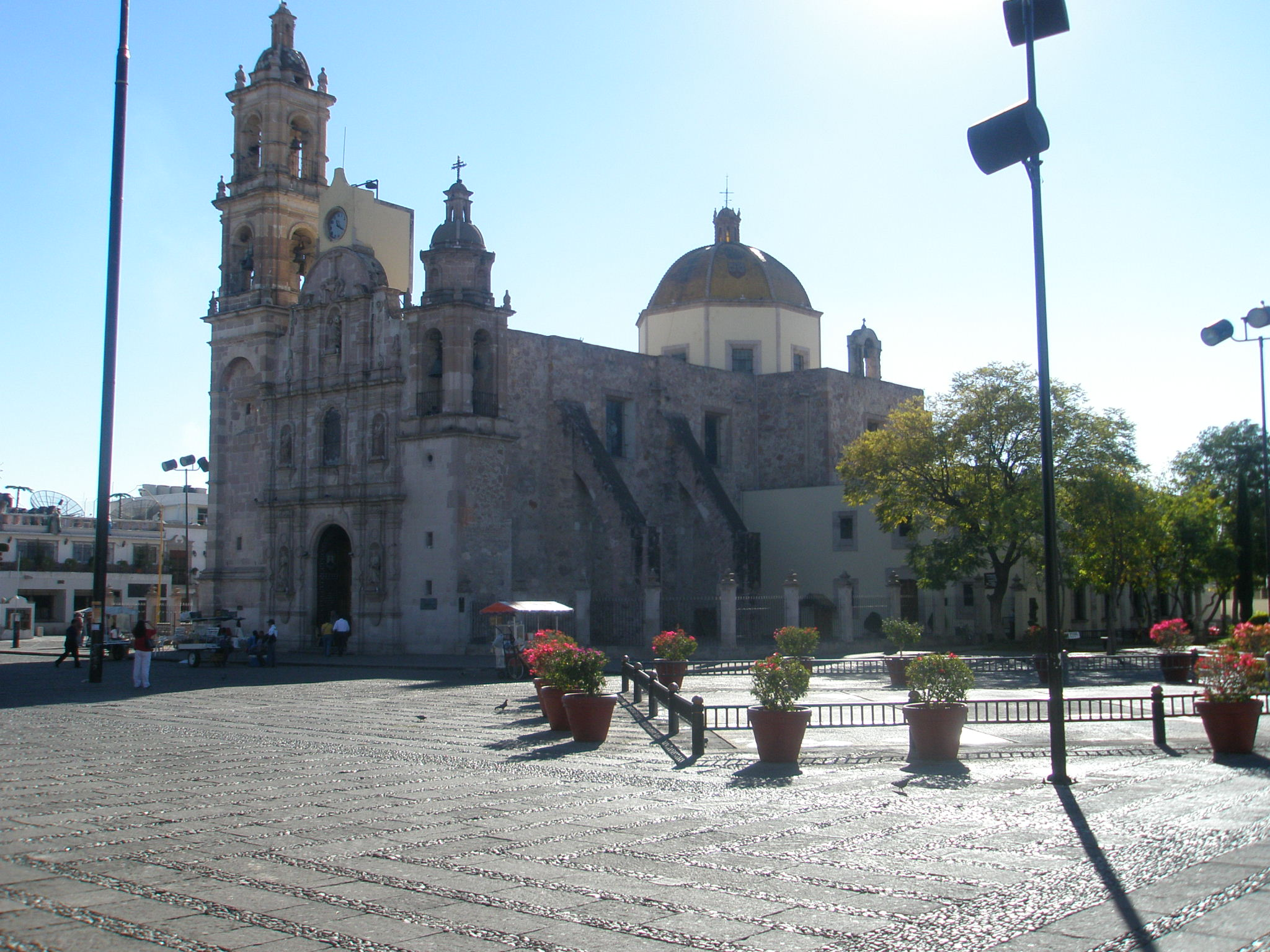 Templo de San Marcos